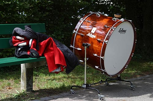 Kant. Musiktage 2004 in Arlesheim